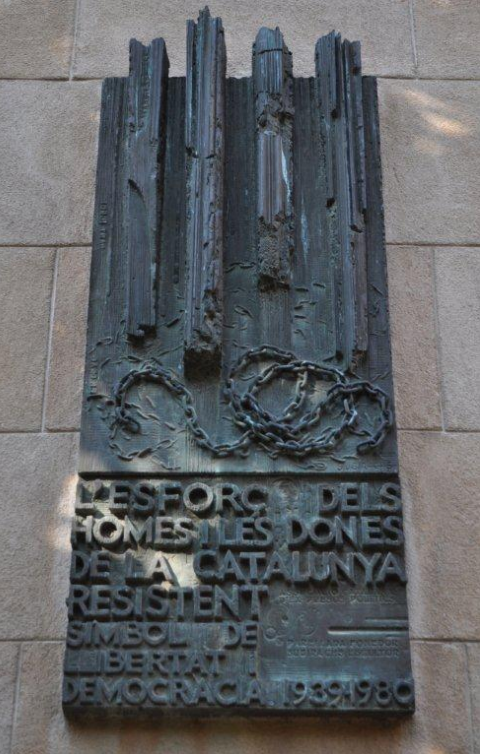 Escultura de Josep Maria Subirachs en forma d'estela commemorativa de bronze realitzada per encàrrec de l'Associació Catalana d'Expresos Polítics del Franquisme i entregada al Parlament de Catalunya el 15 d'octubre de 1981. És titulada "Homenatge a la Resistència (1939-1980)" i la inscripció diu: "L'esforç dels homes i les dones de la Catalunya resistent, símbol de llibertat i democràcia 1939-1980". D'una manera esquemàtica, hi apareix l’emblema heràldic de Catalunya: les quatre barres caient verticalment sobre unes cadenes, símbol de l’esclavitud. Actualment es troba en un mur del pati de la Biblioteca del Parlament de Catalunya.